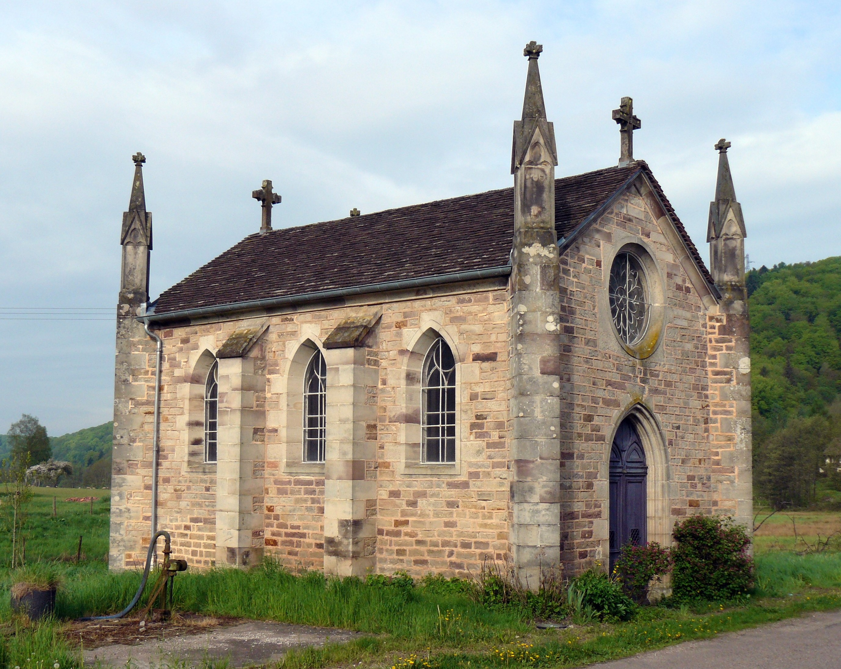 Chapelle Saint-Brice à Saint-Bresson (Haute-Saône, France)